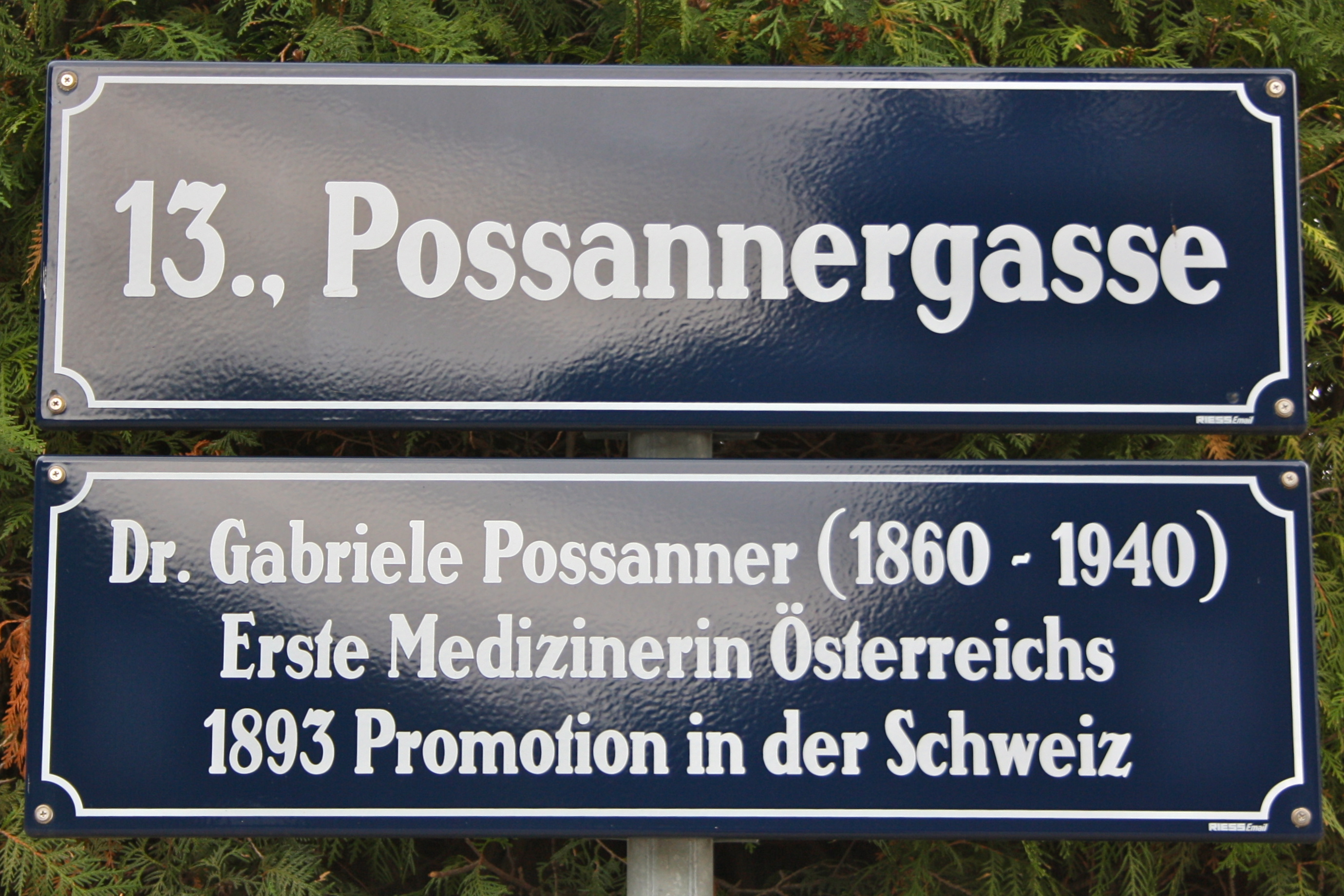 Straßenschild Possannergasse, Wien.